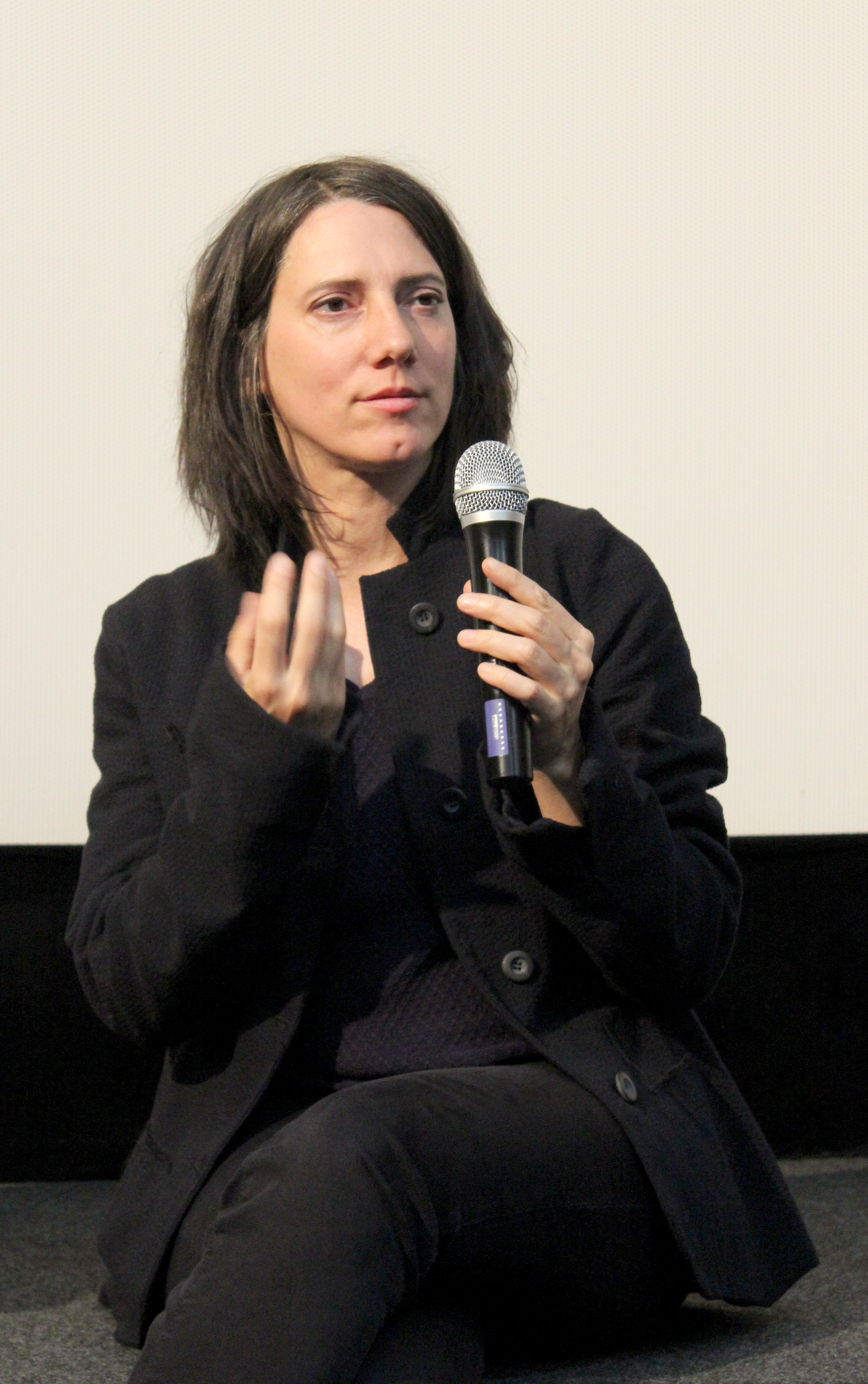 Ziska Riemann (* 10. August 1973 in München als Franziska Riemann) ist eine deutsche Comic-Zeichnerin, Filmregisseurin, Drehbuchautorin und Musikerin. Aufnahme von 2019.